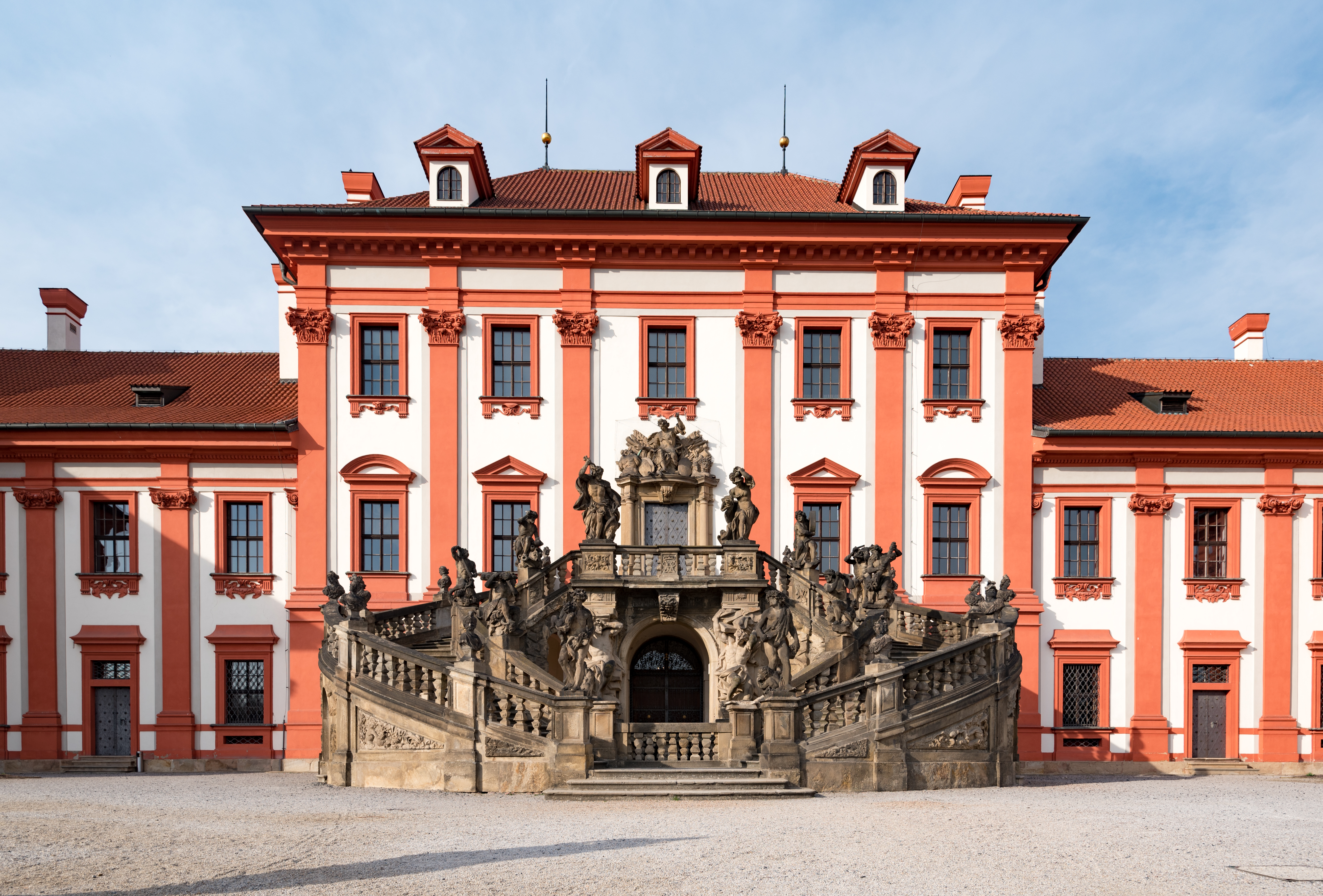 Praha 7, Troja, Trojský zámek